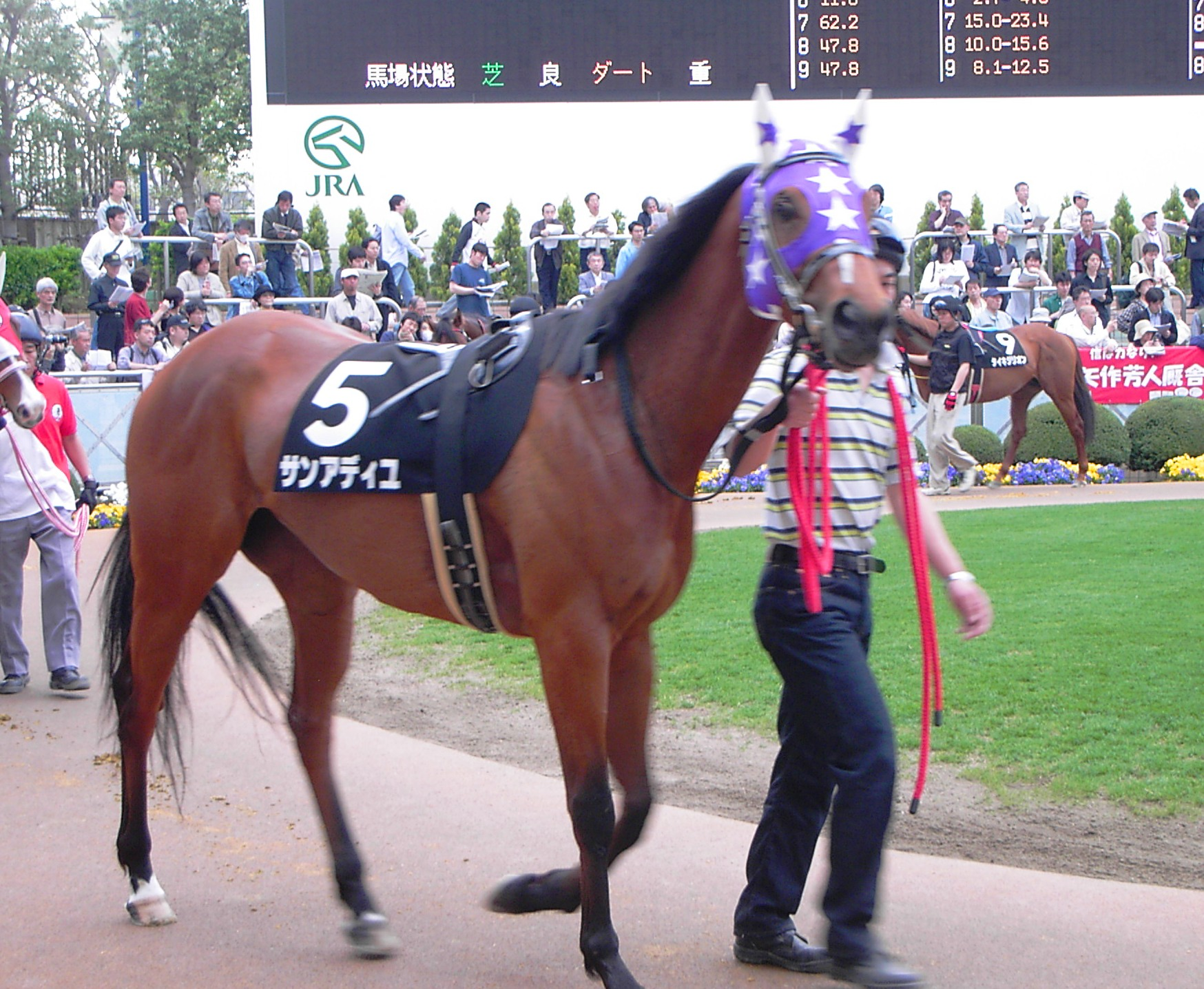 Sans Adieu